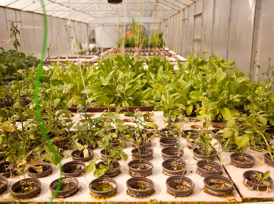 Հայկական առաջին ակվապոնիկ ջերմոցի առաջին նկարներից է։